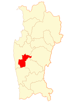 Ubicacion de Punitaqui